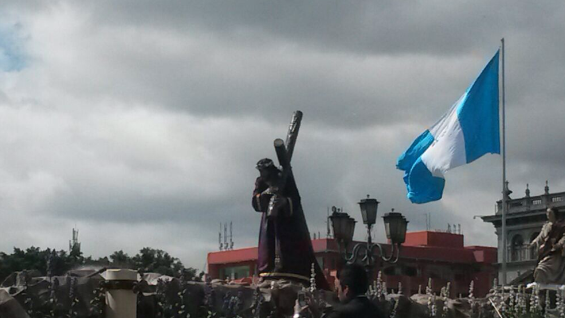 Semana Santa 2015 en Ciudad de Guatemala